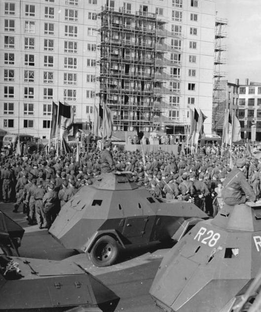 ADN-ZB-23.8.1961-Berlin: Sicherung der Staatsgrenze am 13.8.1961. Appell der Berliner Kampfgruppen am 23.8.1961 in der Karl-Marx-Allee.